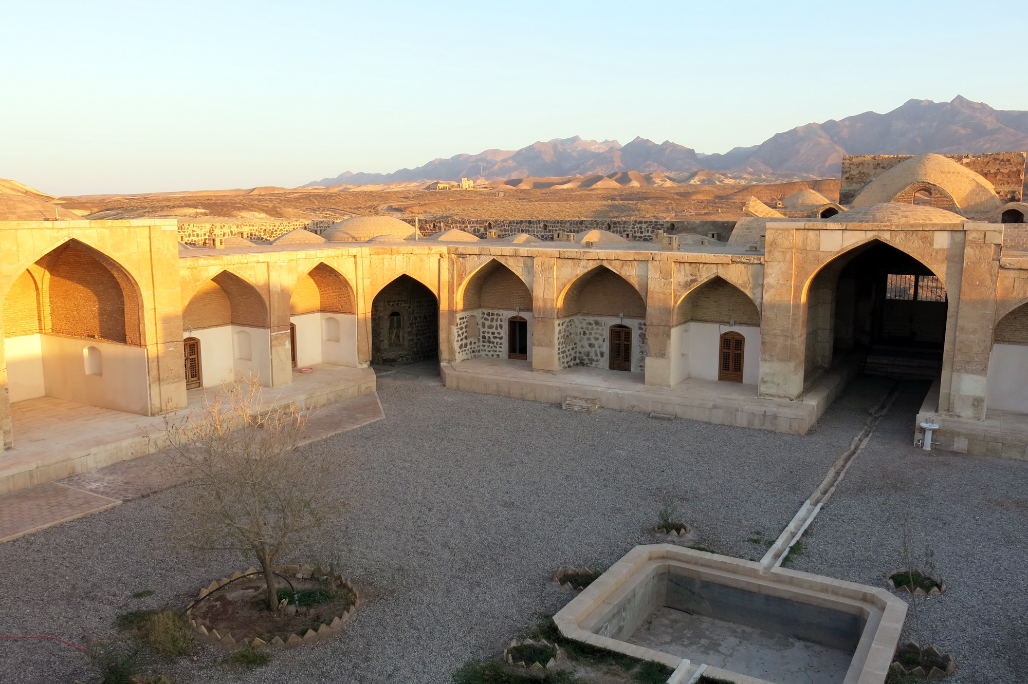 کاوانسرای قصر بهرام در جنوب گرمسار